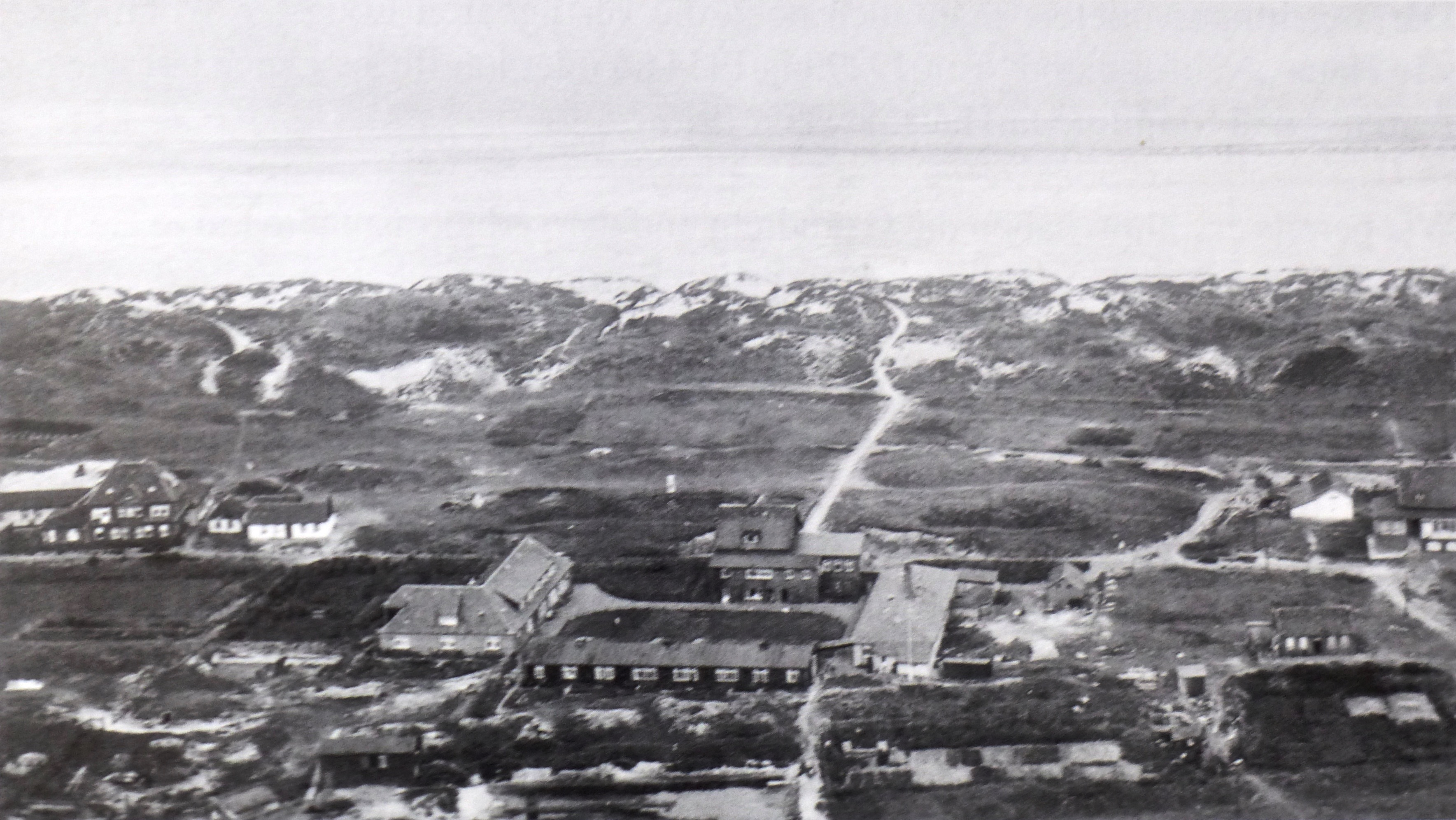 Historische Luftaufnahme der Schule am Meer im Loog auf Juist aus dem Jahr 1929. Das Bild entstand über dem Watt und zeigt die Vogelperspektive in nördlicher Richtung zum Nordseestrand hin, der sich im oberen Drittel der Aufnahme zeigt. Unterhalb der Bildmitte ist das Kernareal der Schule am Meer zu erkennen, das vom Hauptgebäude "Diesseits" (nördl.), den Schülerunterkünften im "Jenseits" (südl.), der "Westfalenhalle" (östl.) und der "Arche" (westl.) begrenzt wird. Südl. der "Westfalenhalle" erkennt man den weißen Mast des Flaggenplatzes. Südl. des "Jenseits" erkennt man neben einem größeren Teich den "Olymp" mit Stall, südwestl. davon einen niedrigeren Schuppen. An die "Arche" grenzt westl. der botanische Garten der S.a.M. an, der bis etwa zum Ubben-/Mamminga-Haus reicht. Westl. davon sieht man das Walmdach des "do" (Doyen-Haus), an das sich westlich der naturwissenschaftliche Anbau "mi" und nördlich der Anbau "re" anschließen. Nördlich des Hauptgebäudes "Diesseits" mit Speise-/Probensaal wurde 1930/31 die schuleigene Theaterhalle errichtet.